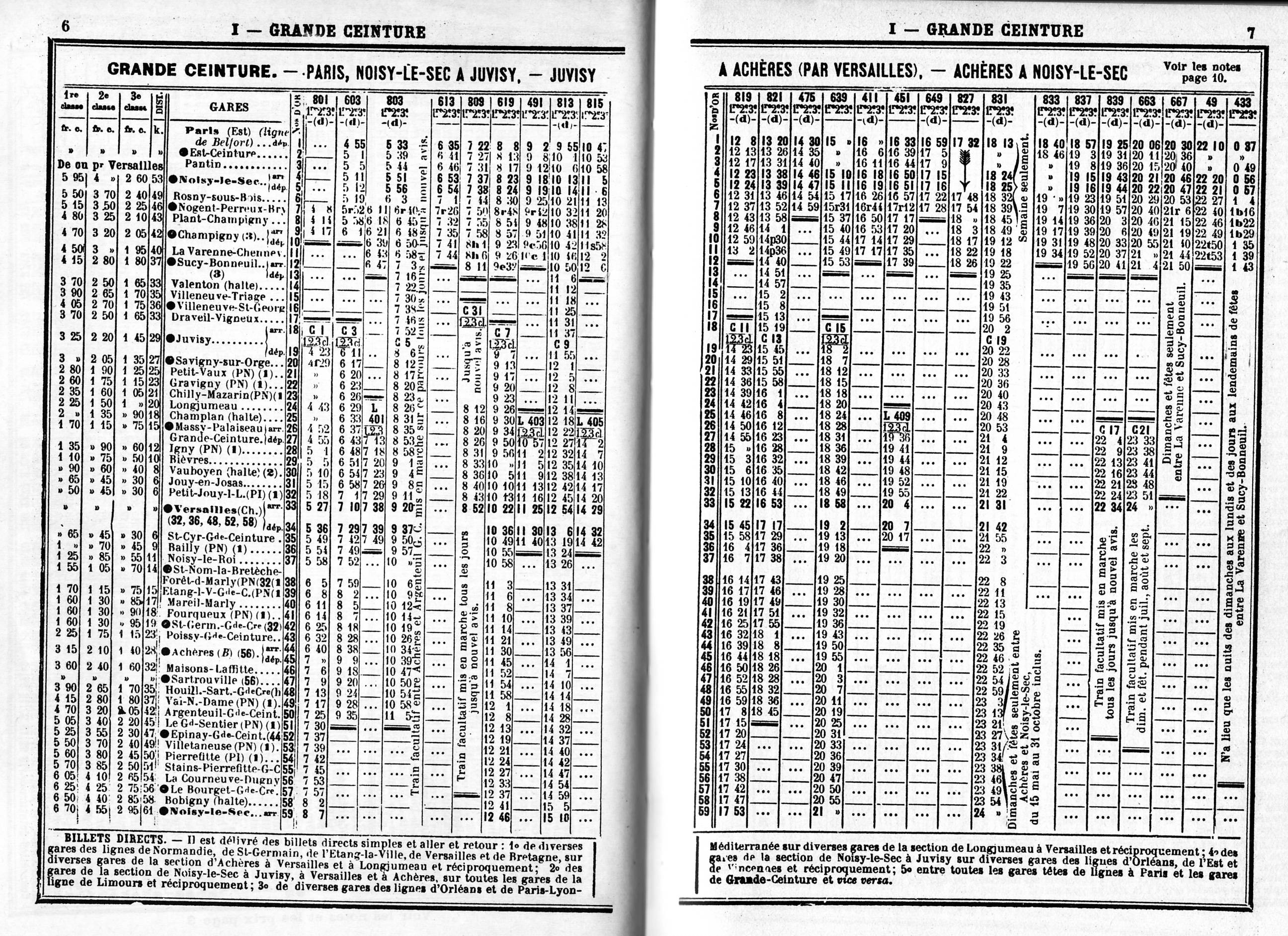 Horaires de la Grande Ceinture en mai 1914 - Livret Chaix